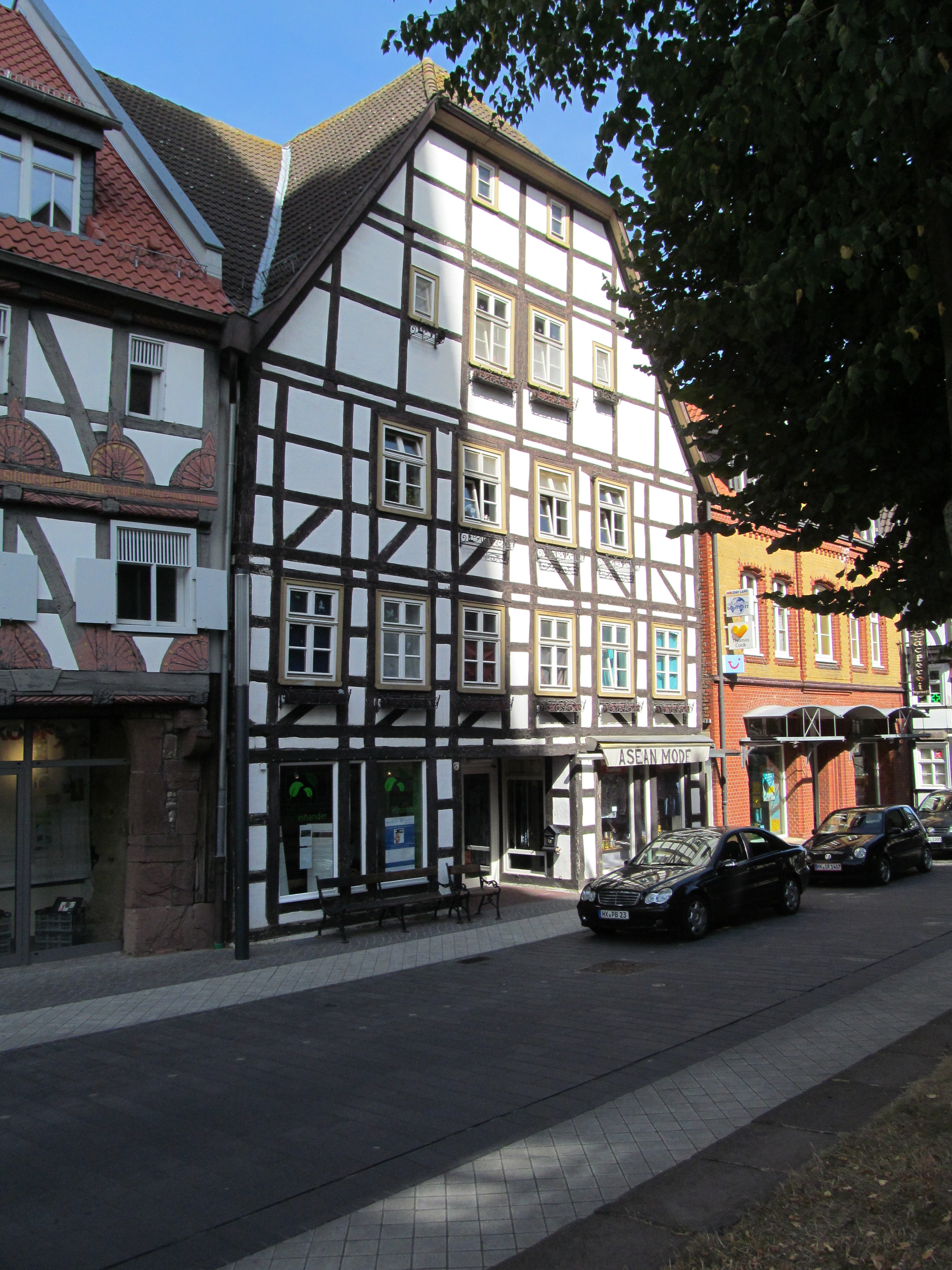 das Haus Hauptstraße 50 in Warburg